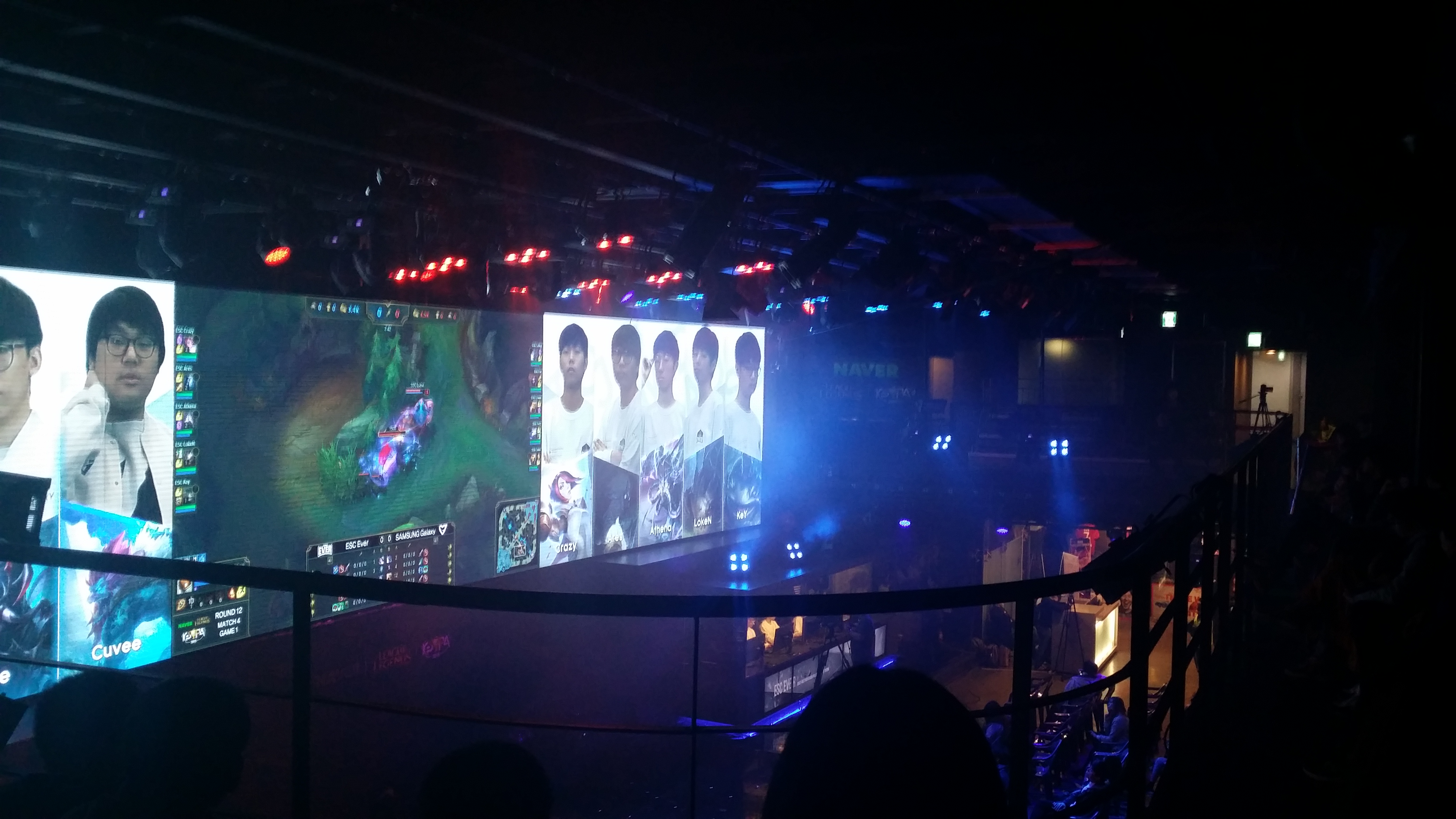 넥슨 아레나 내부